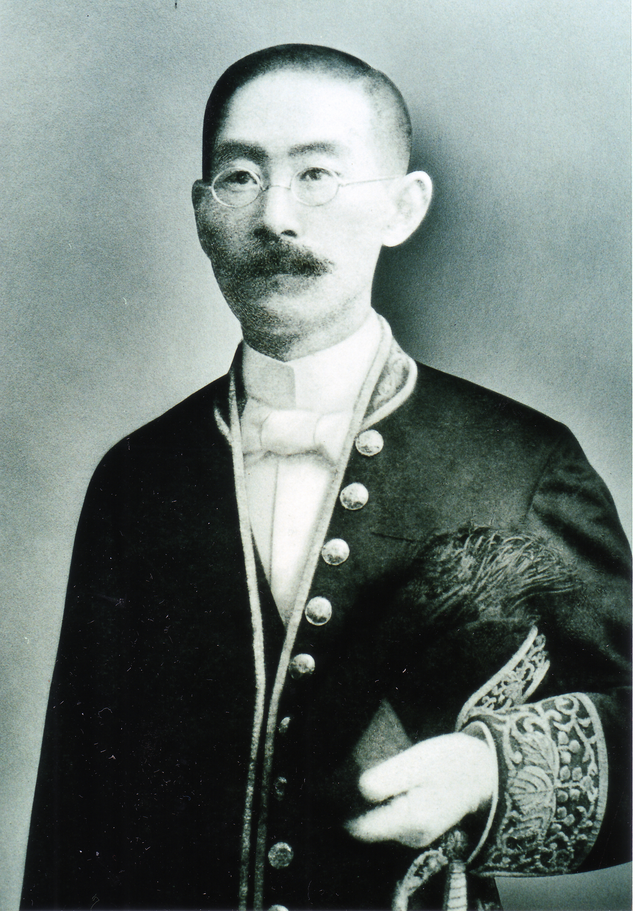 叙勲に際して